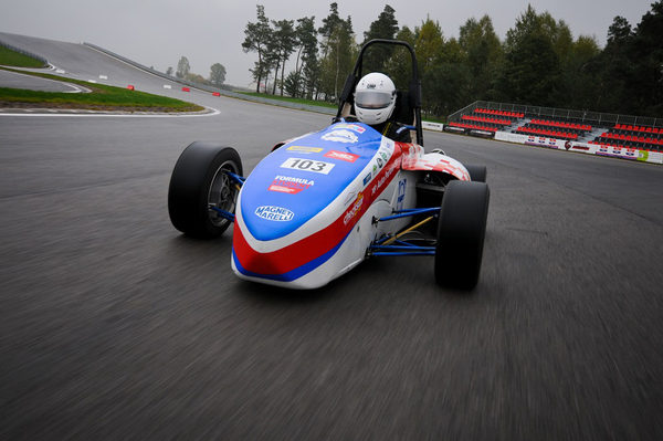 Bolid WT-01 podczas testów na Autodromie Jastrząb